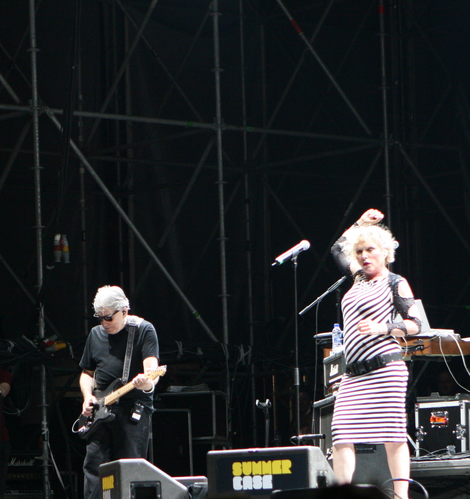 Blondie en el Summercase 08 de Barcelona